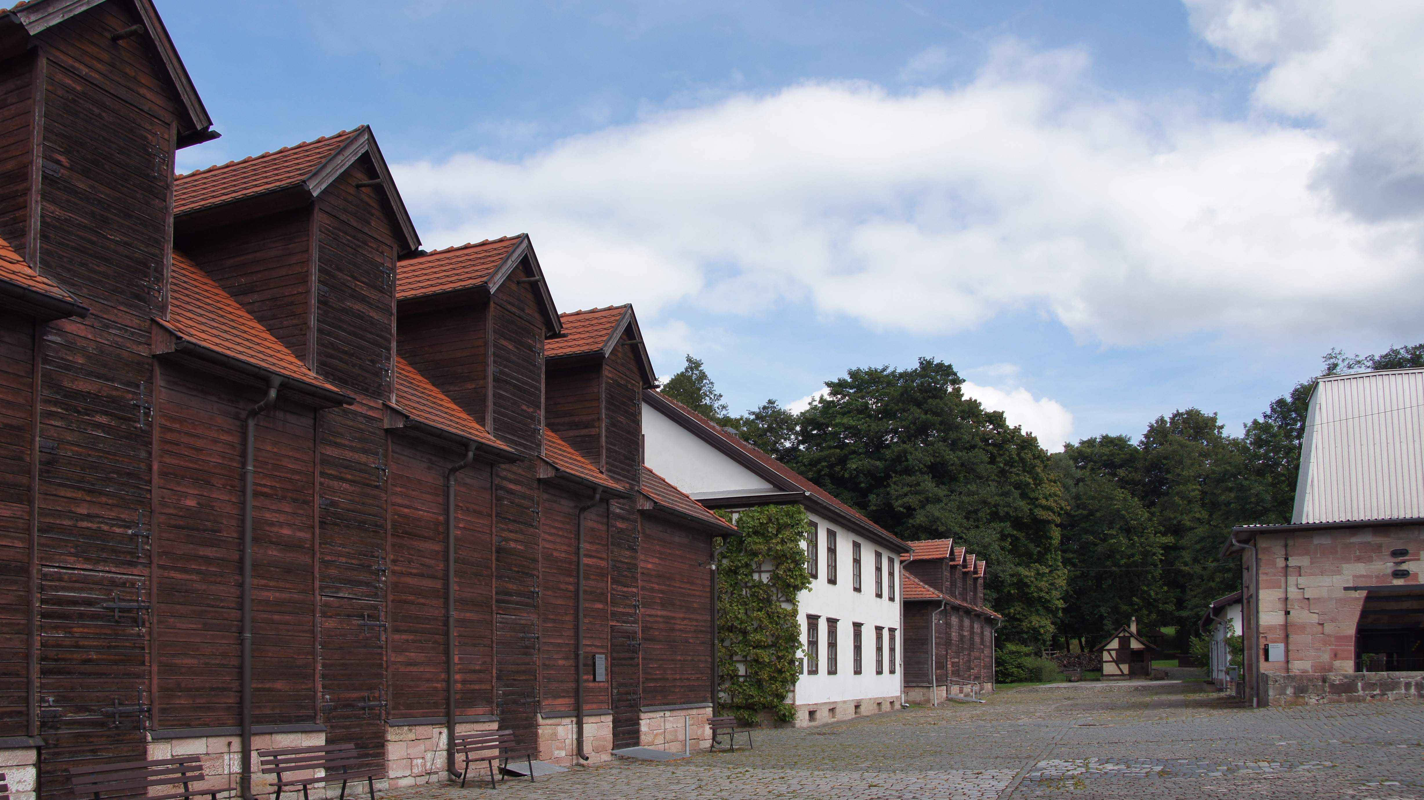 Neue Hütte - Schmalkalden - 20120902-07